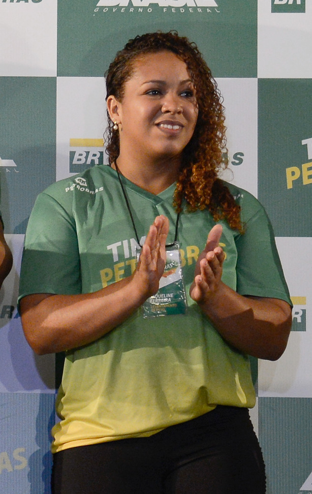 Rio de Janeiro - Atletas olímpicos que representam o Brasil nos Jogos Rio 2016 patrocinados pela Petrobras (Fernando Frazão/Agência Brasil)